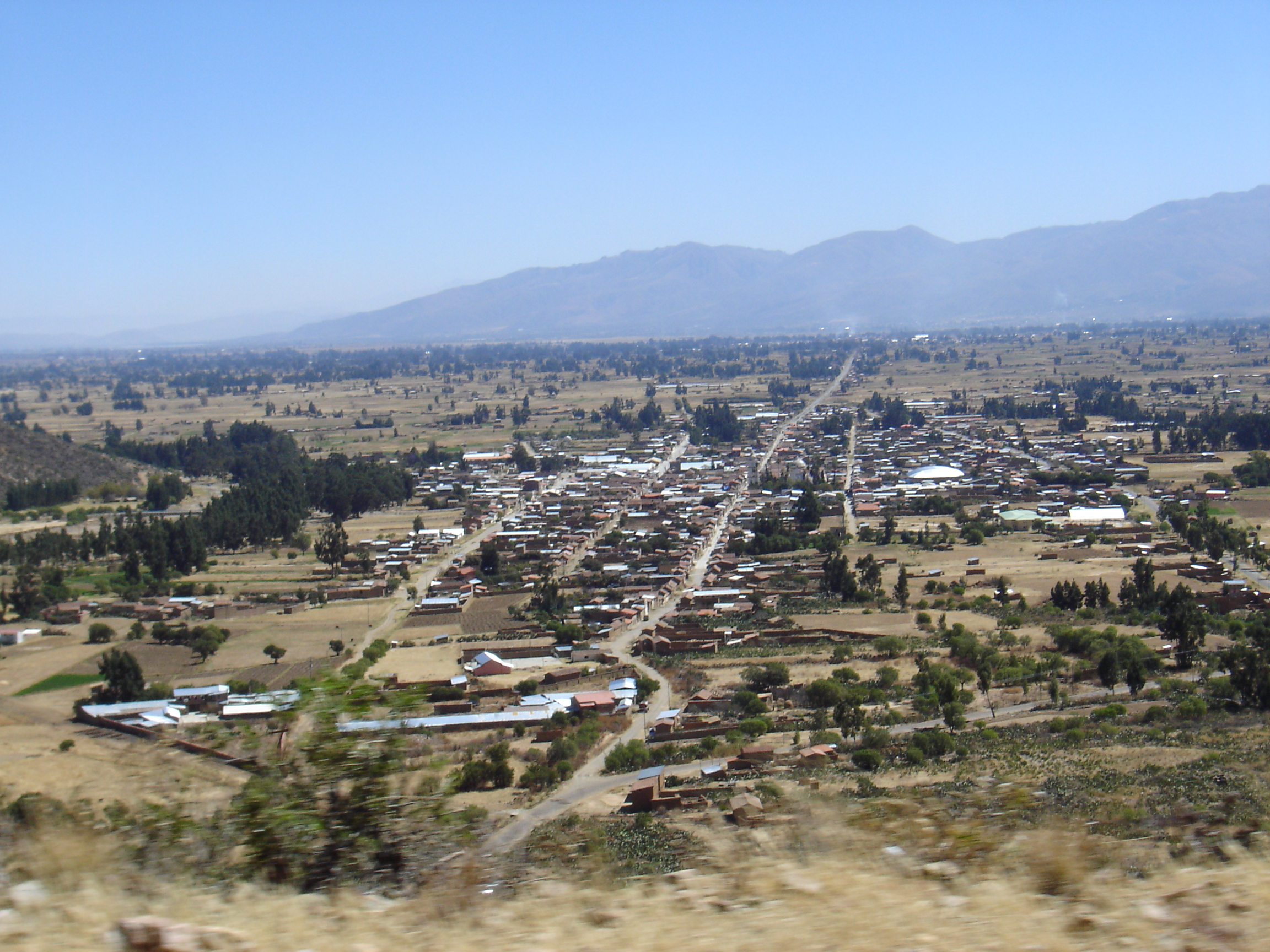 Una vista panorámica de la población de Arani, desde el cerro que esta al este del pueblo y por donde va el camino que conduce a Vacas y Mizque. Runa Simi: Juq qhawariy Arani llaqtata, anti riqpi urqumantapacha maynintachus yan risqan Wak'asman Misk'imanwan.